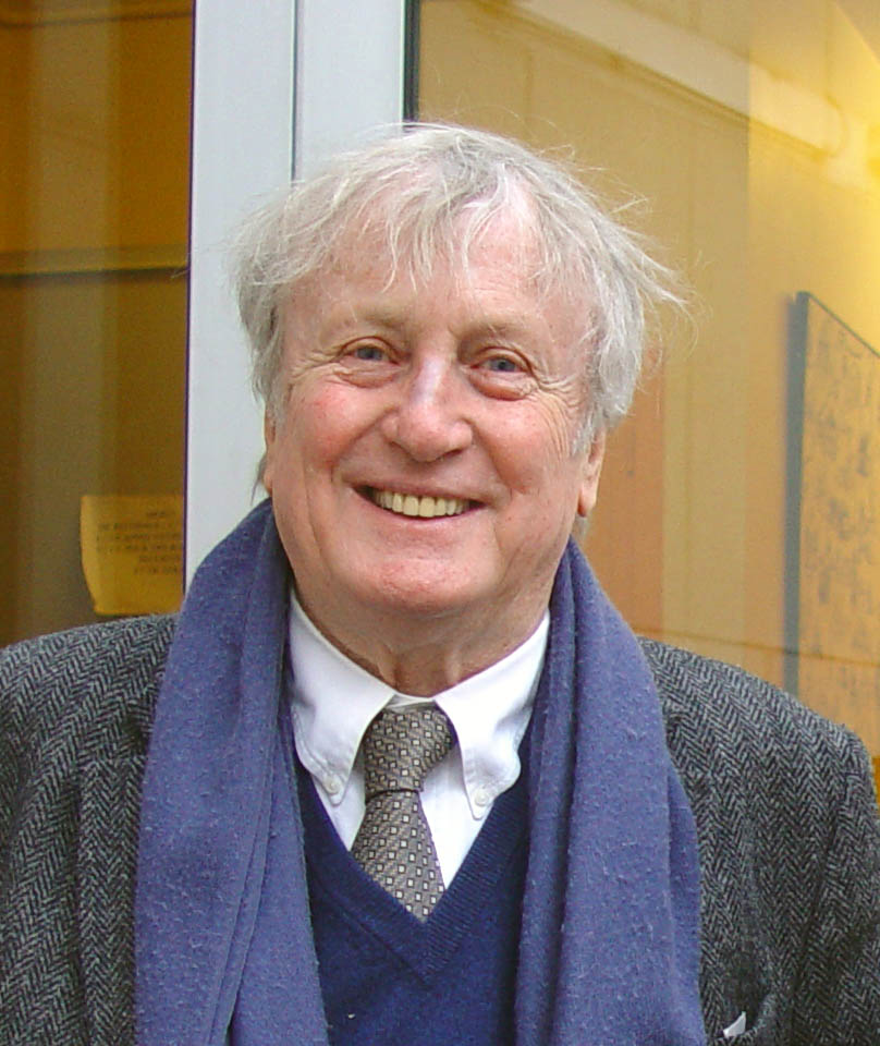 2007, Centre culturel Uccle.